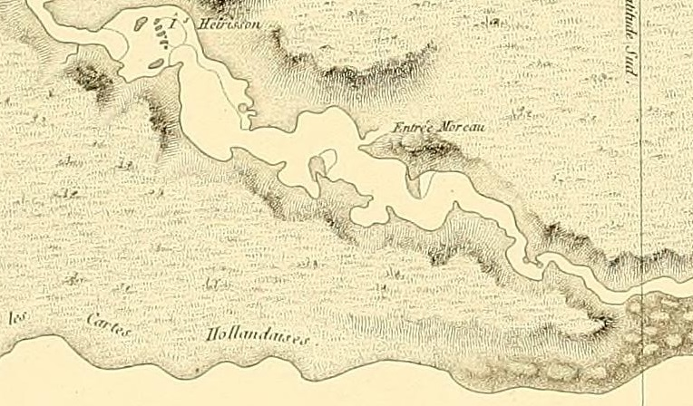 Carte de Freycinet de l'entrée Moreau sur la rivière des Cygnes